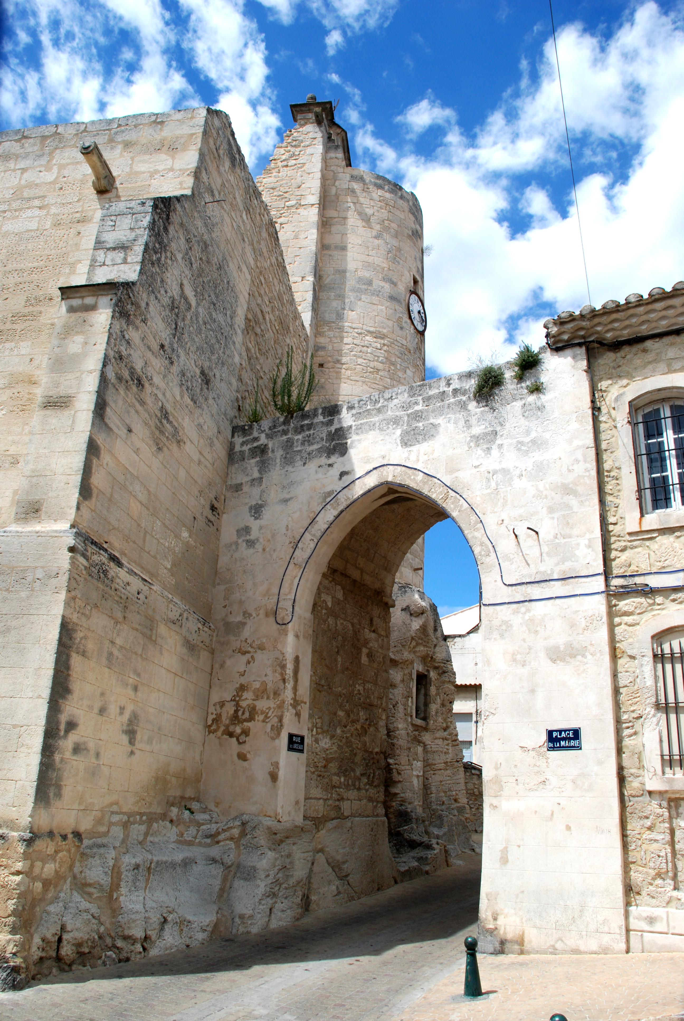 France - Gard - Église Saint-Grégoire de Théziers